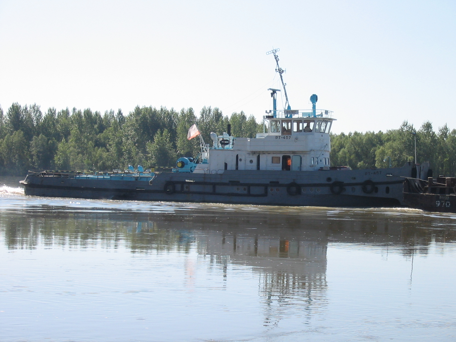 Буксир-токач РТ-457